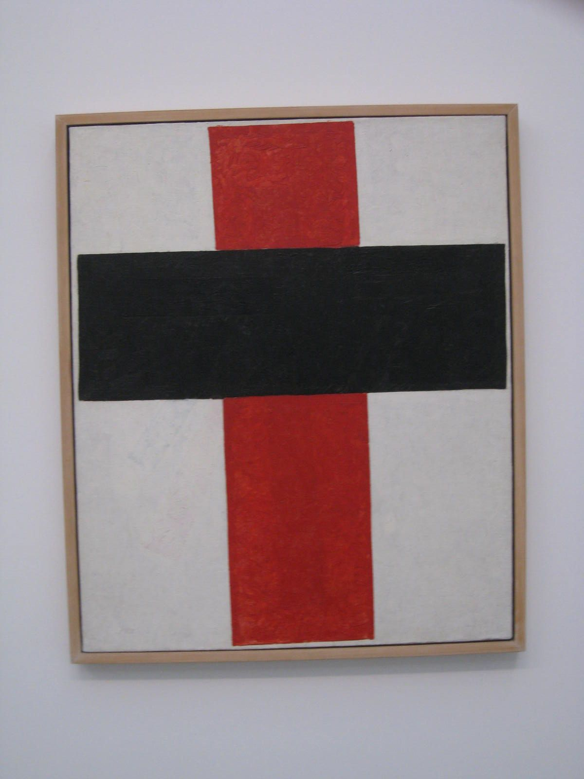 Suprematisch Kruis (1920-21)title QS:P1476,nl:"Suprematisch Kruis (1920-21)" label QS:Lnl,"Suprematisch Kruis (1920-21)"